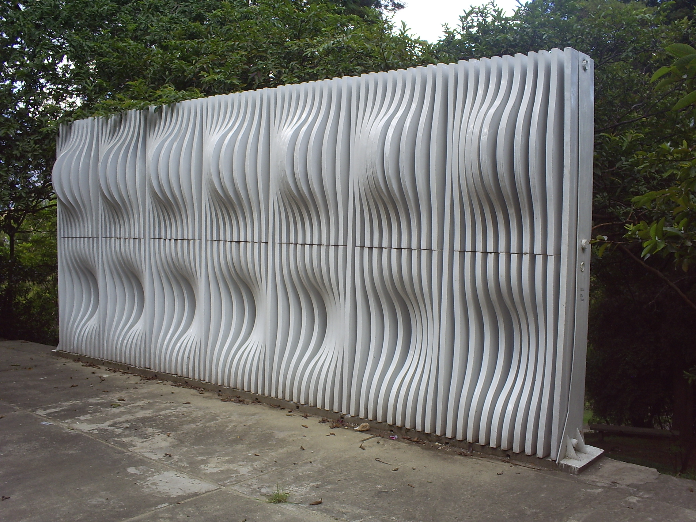 escultura en el Cerro Nutibara. Medellín, Colombia